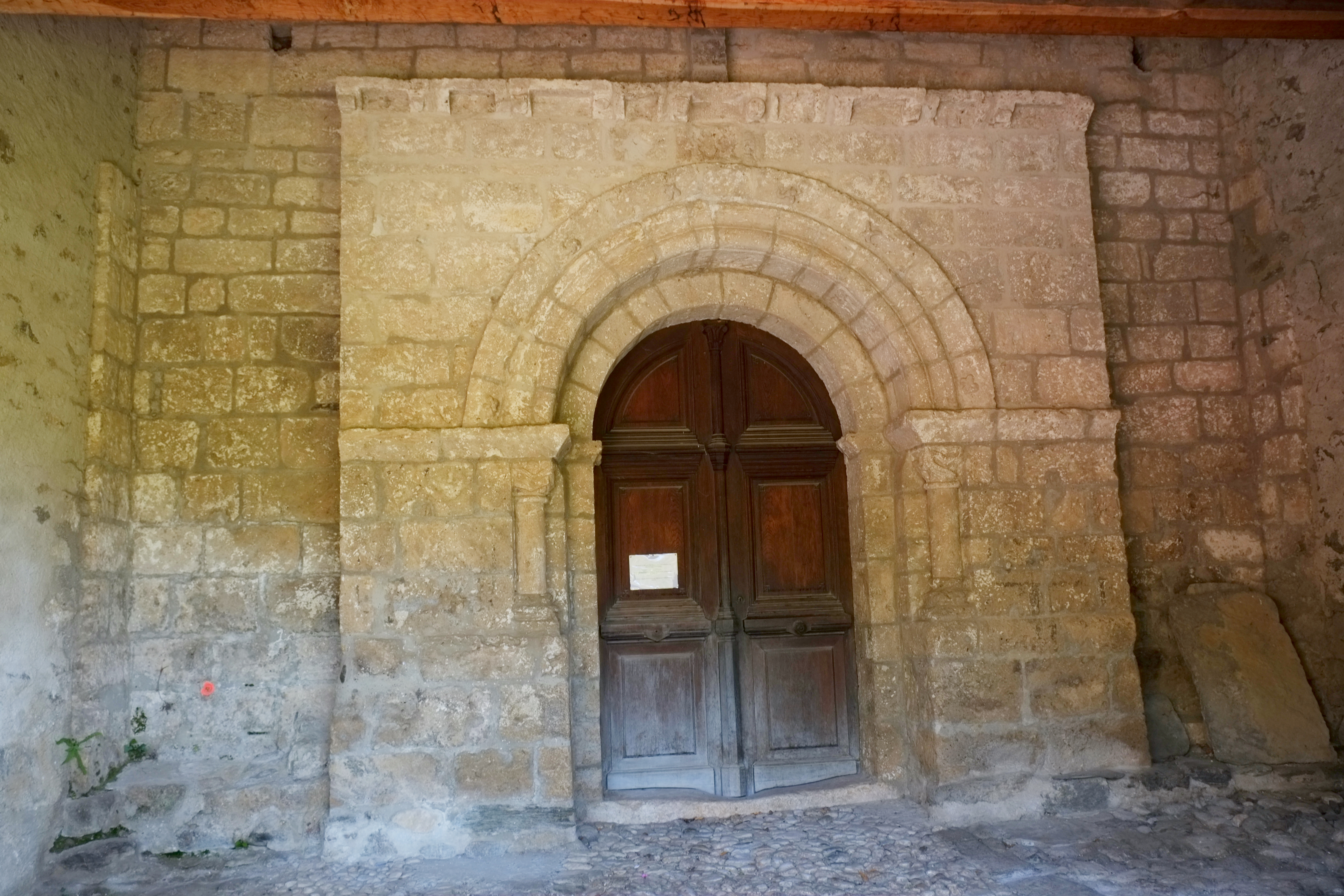 Kirche Saint-Julien in Axiat im Département Ariège der Region Midi-Pyrénées (Frankreich)